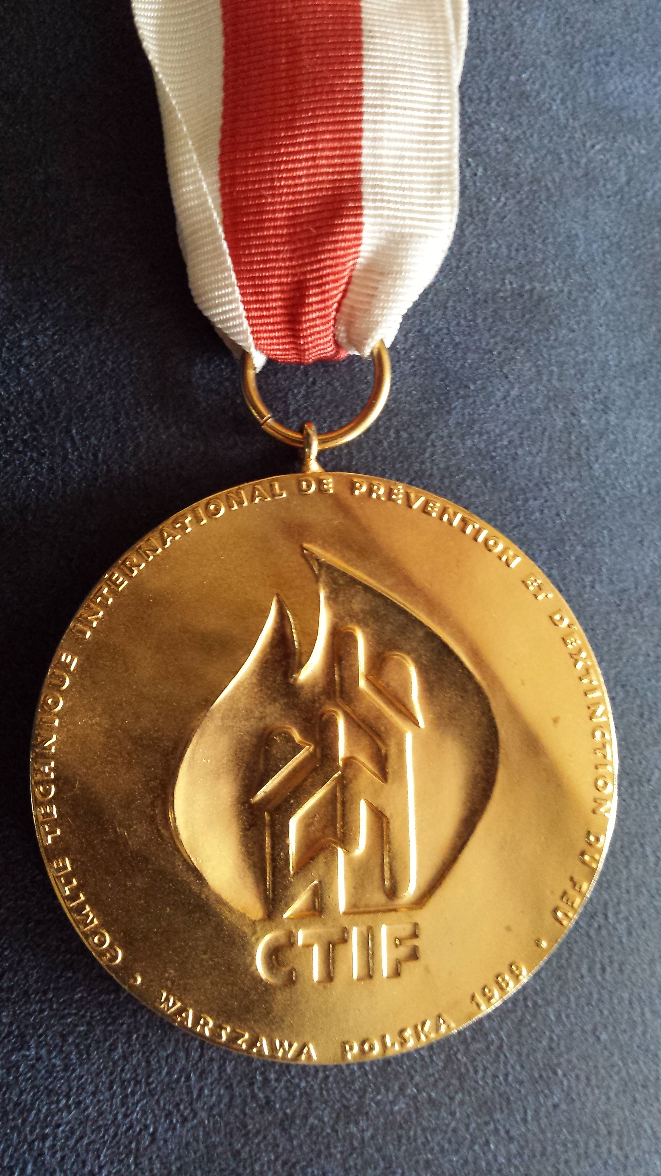 Internationale Feuerwehrsportwettkampfmedaille des CTIF 1989 - Rückseite